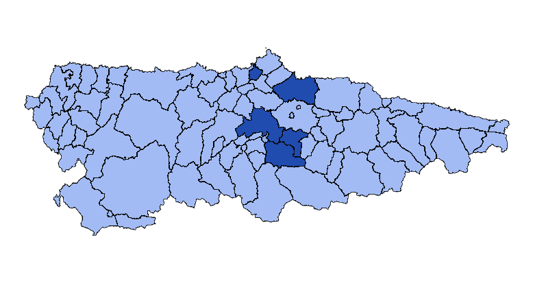 Concejos Asturianos que forman el Ocho Astur